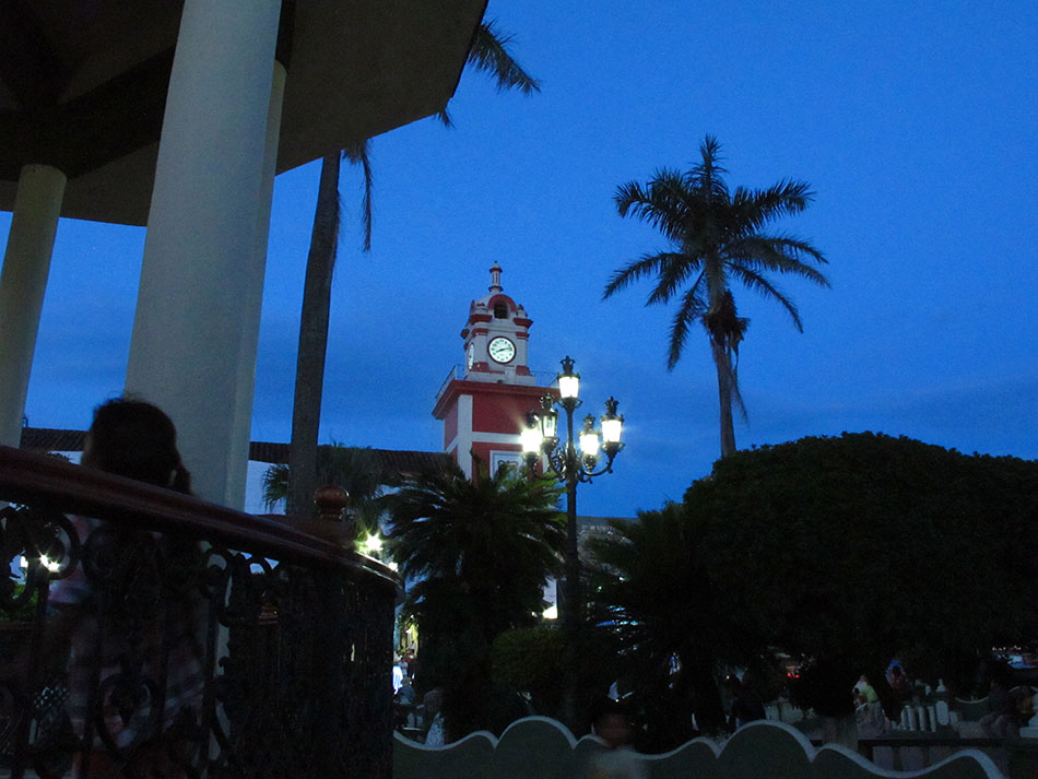 Vista del plaza — Santiago Tuxtla, Veracruz.